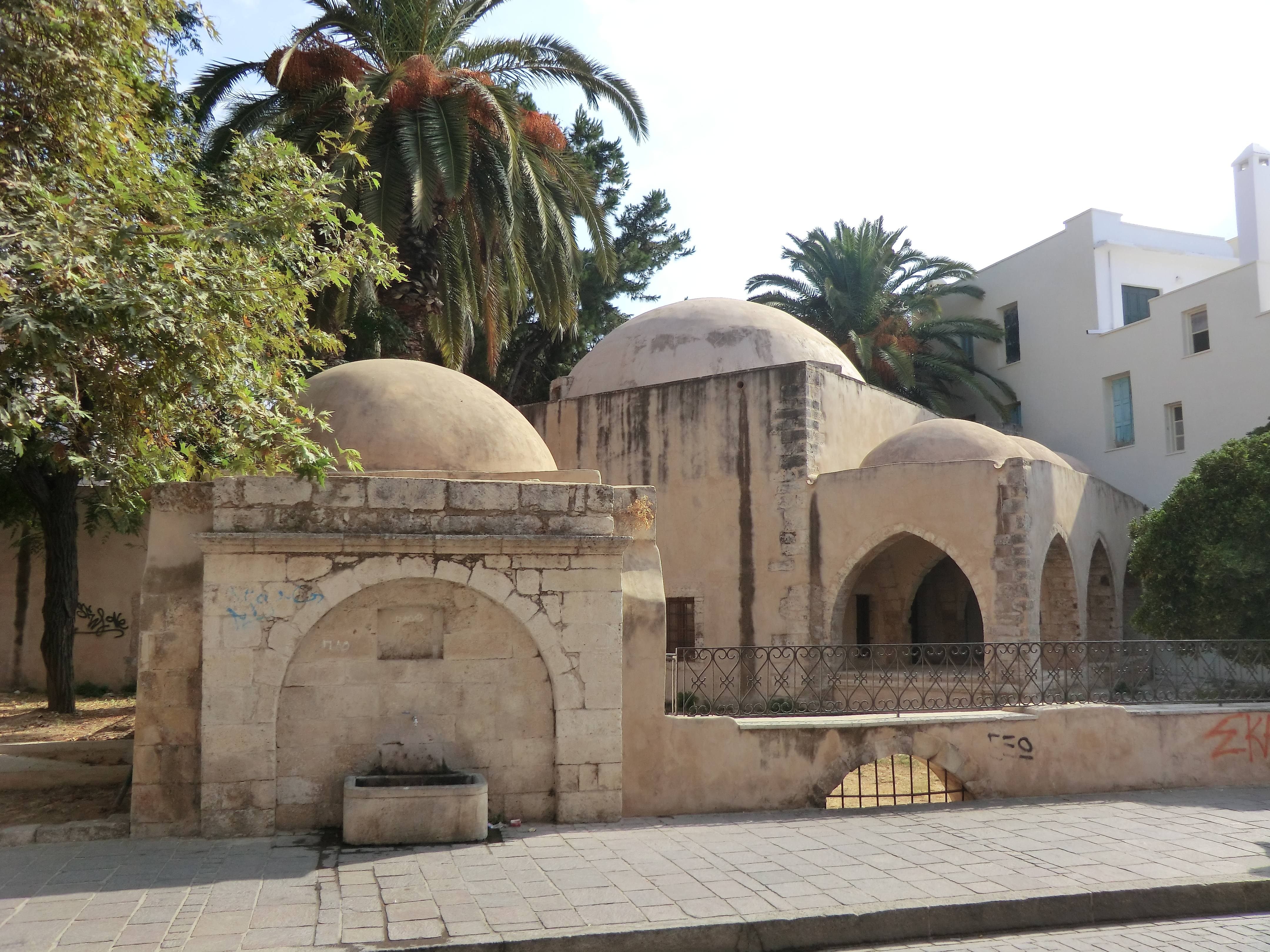 Mosquée Kara Musa Pasha.